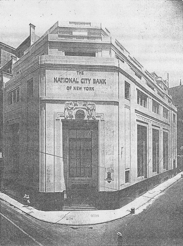 Vista de la fachada de la sede del The National City Bank of New York en Buenos Aires. Esquina sudoeste de las calles Bartolomé Mitre y San Martín.